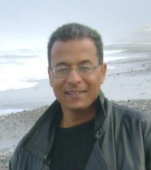 ALI ALOUI